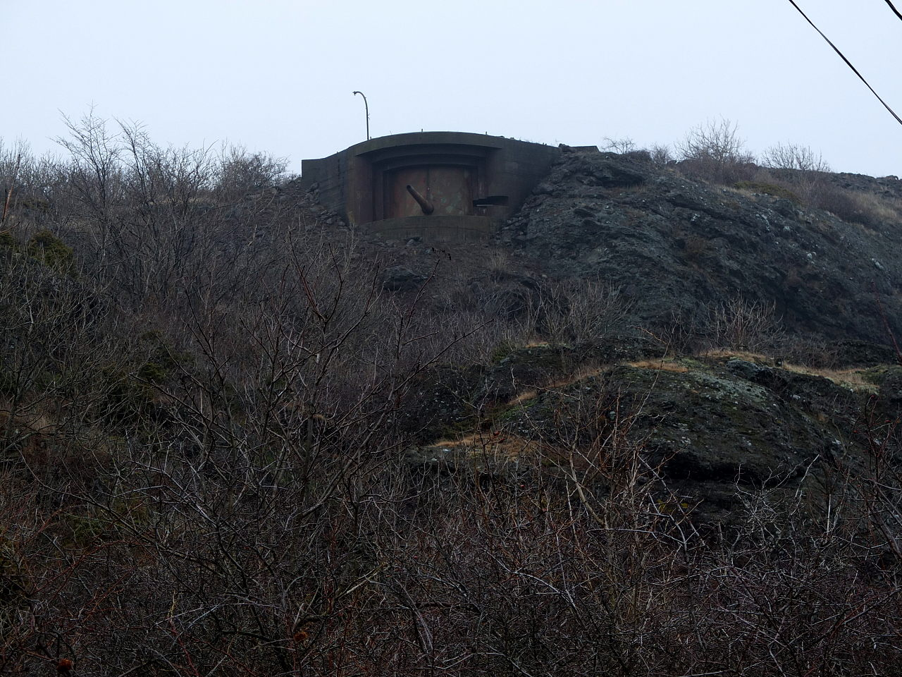 Rauøy fort i Oslofjorden